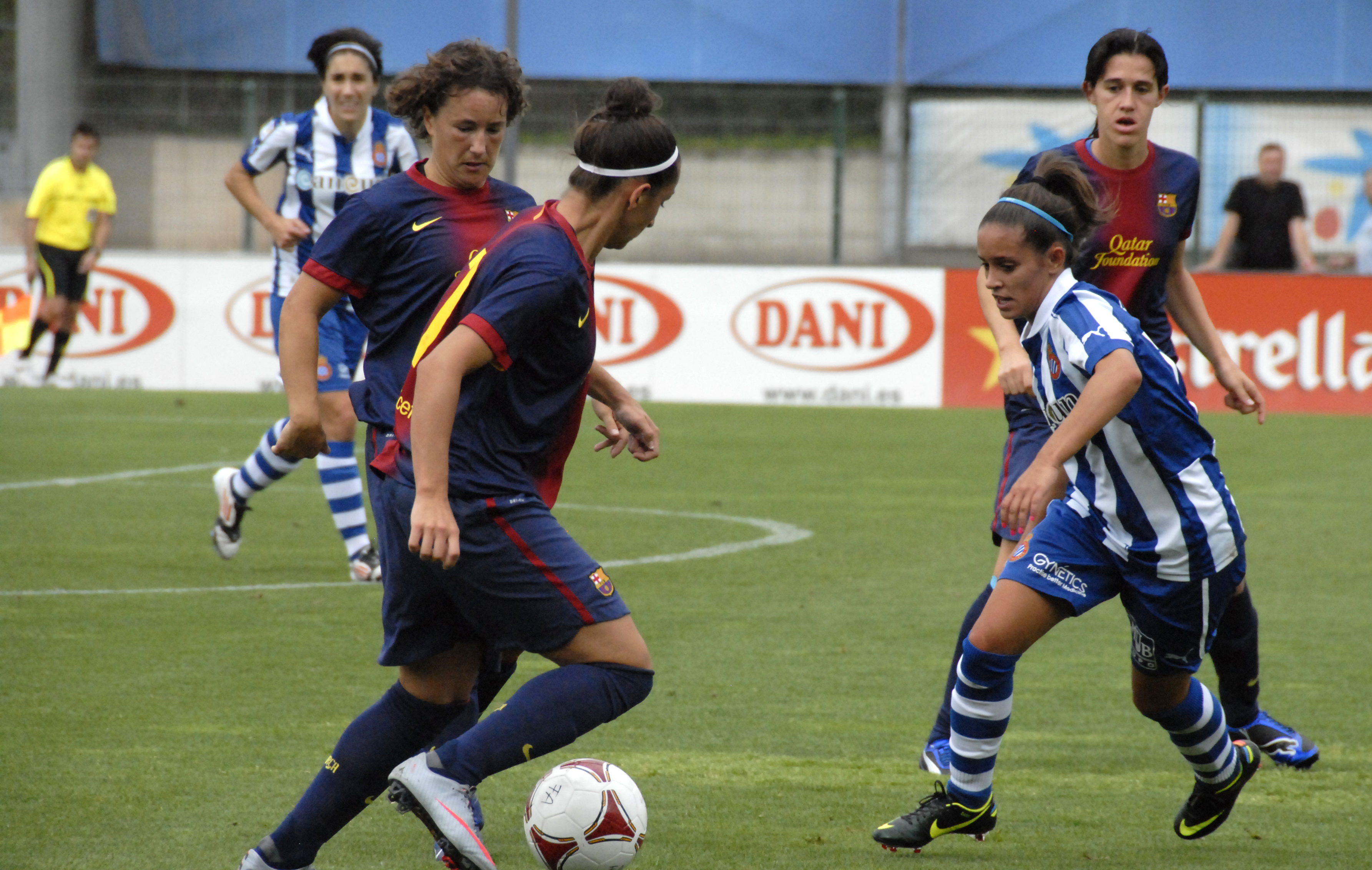 RCDE 2 - 0 FCB